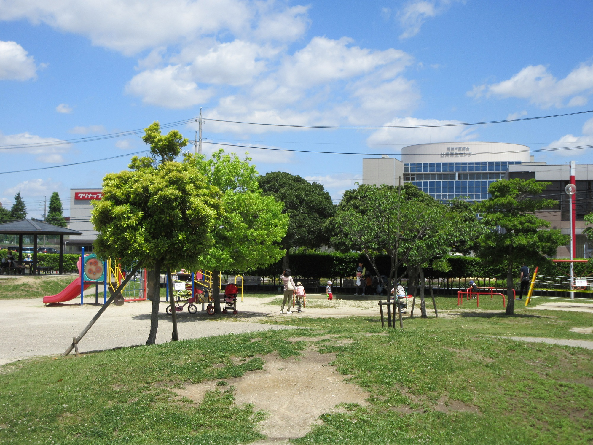 奈良井公園（愛知県岡崎市）